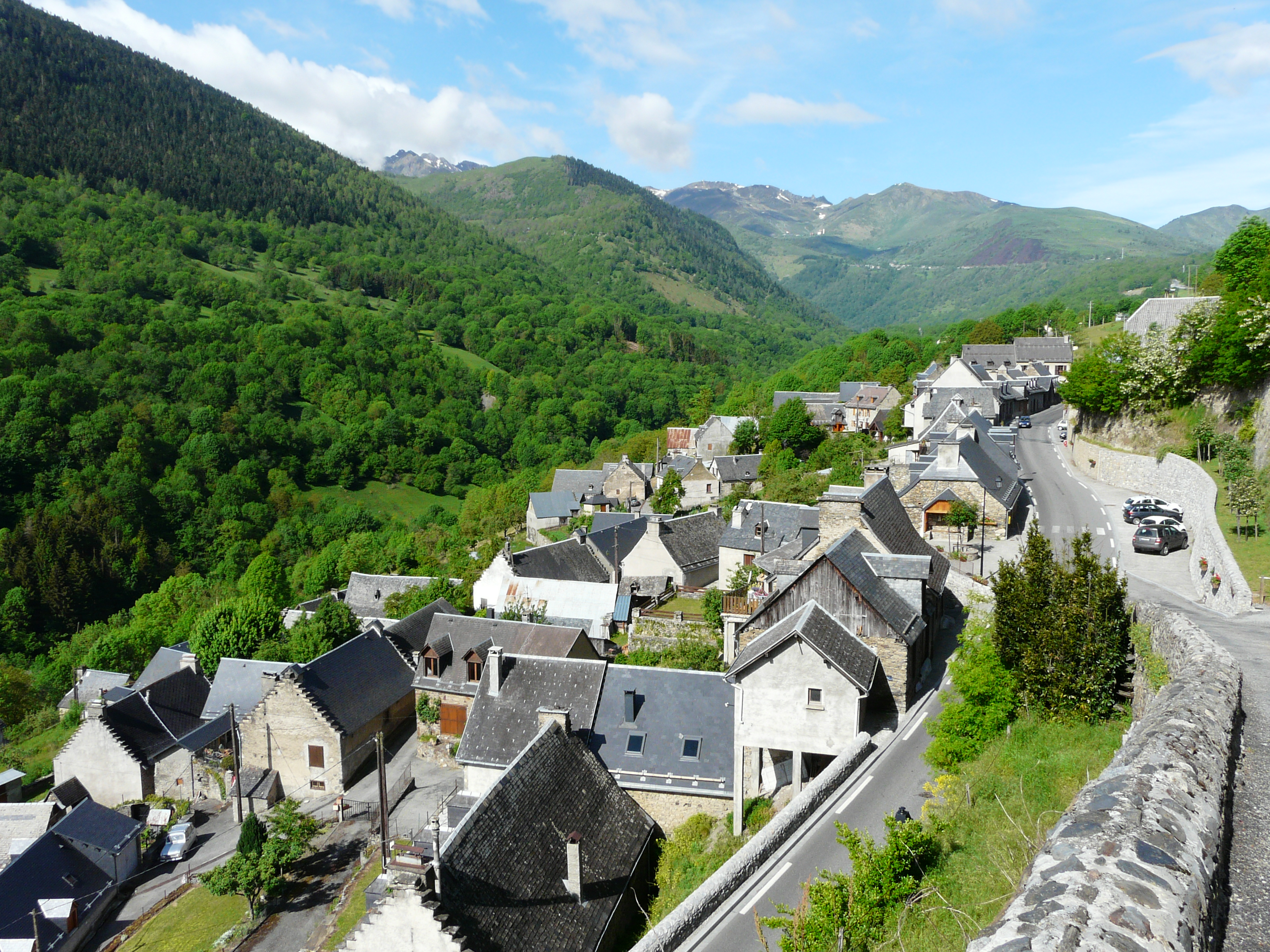 Le village de Saint-Aventin (Haute-Garonne, Midi-Pyrénées, France).